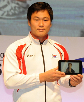 삼성전자 How to PLAY SMART 캠페인 발표회